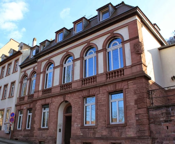 Haus der Verbindung Leonensia in Heidelberg. Erbaut 1893 unter dem Architekten Friedrich Müller. 1907 Ausbau unter Franz Sales Kuhn